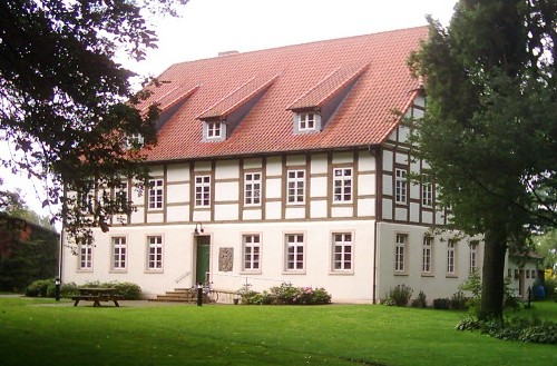 Die Auburg in Wagenfeld, Kreis DiepholzEsperanto: historia trabfaka domo Auburg en Wagenfeld